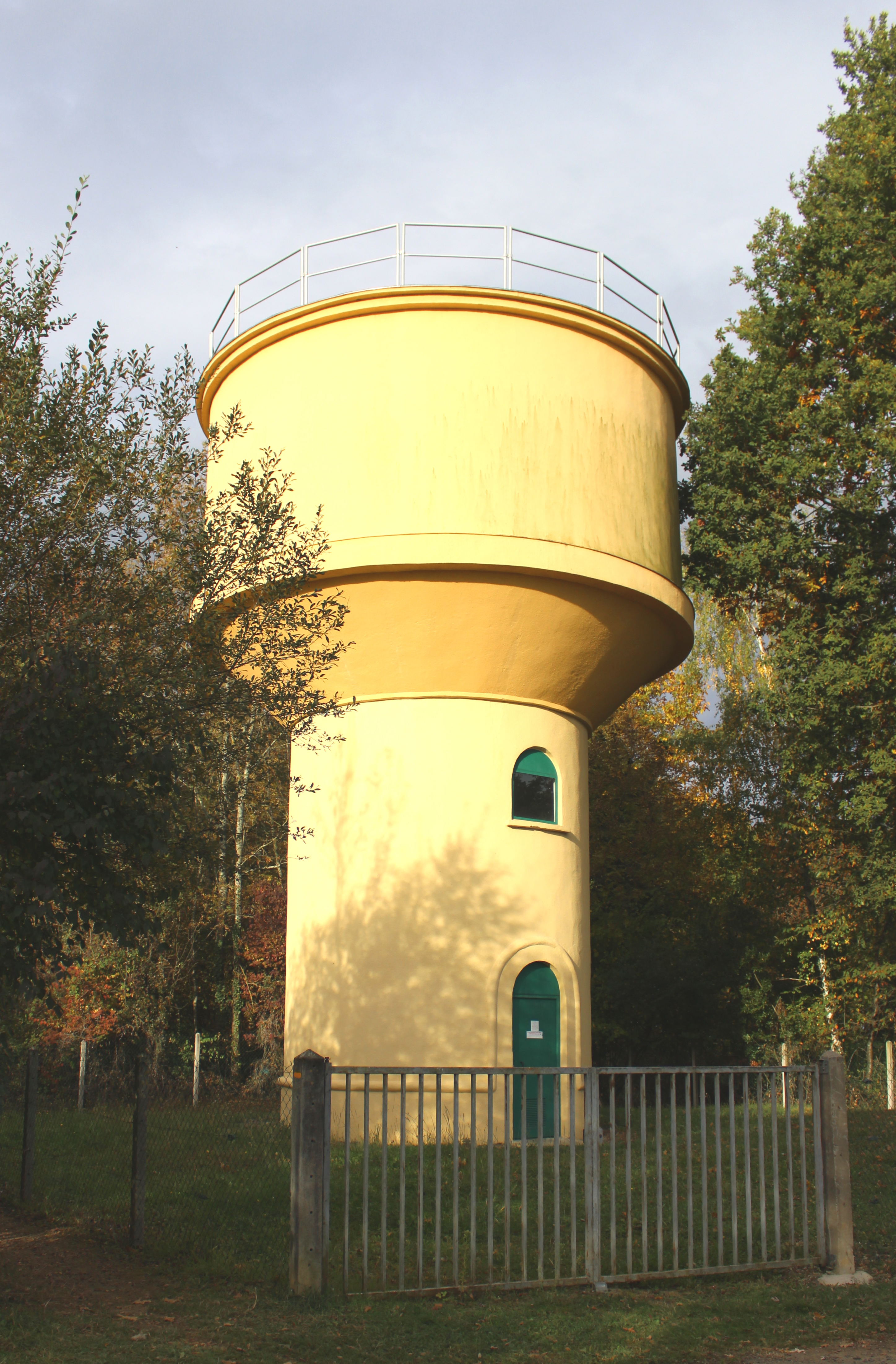 Château d'eau de Sarrouilles (Hautes-Pyrénées)